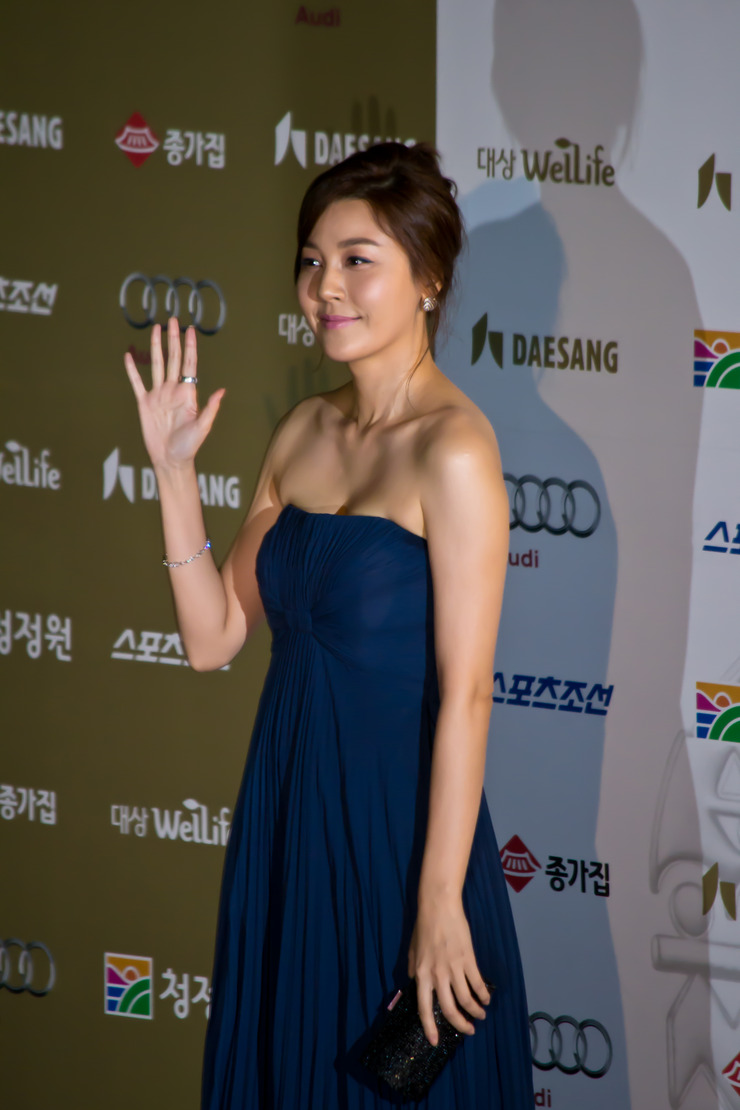 김하늘